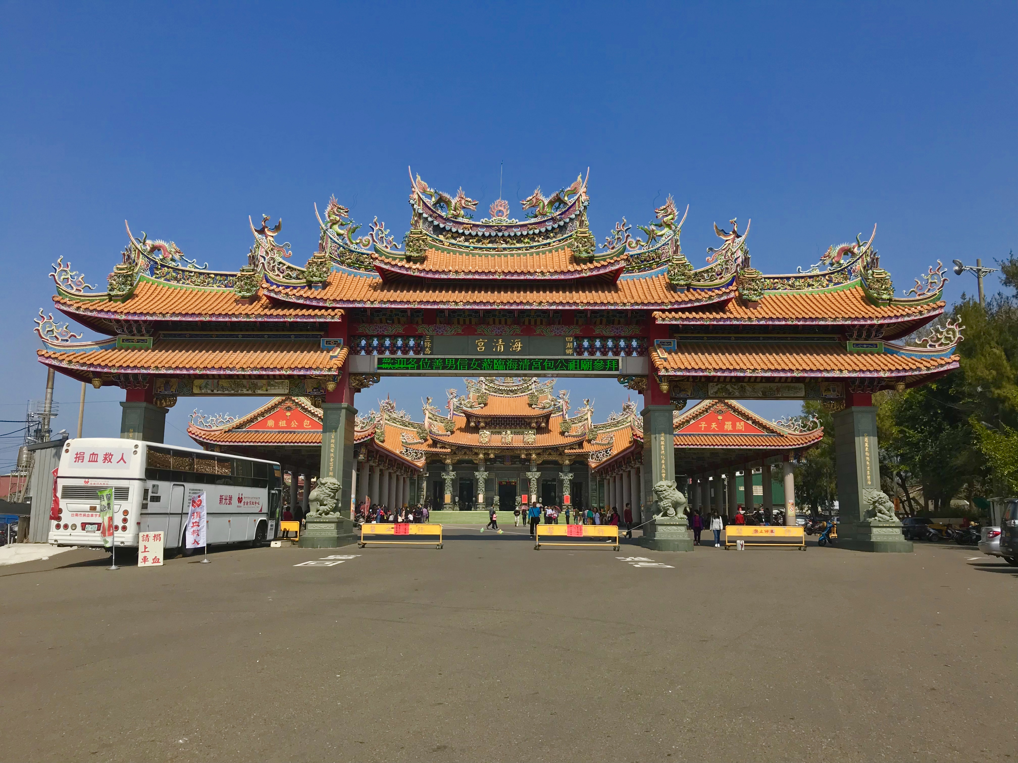 三條崙海清宮牌樓